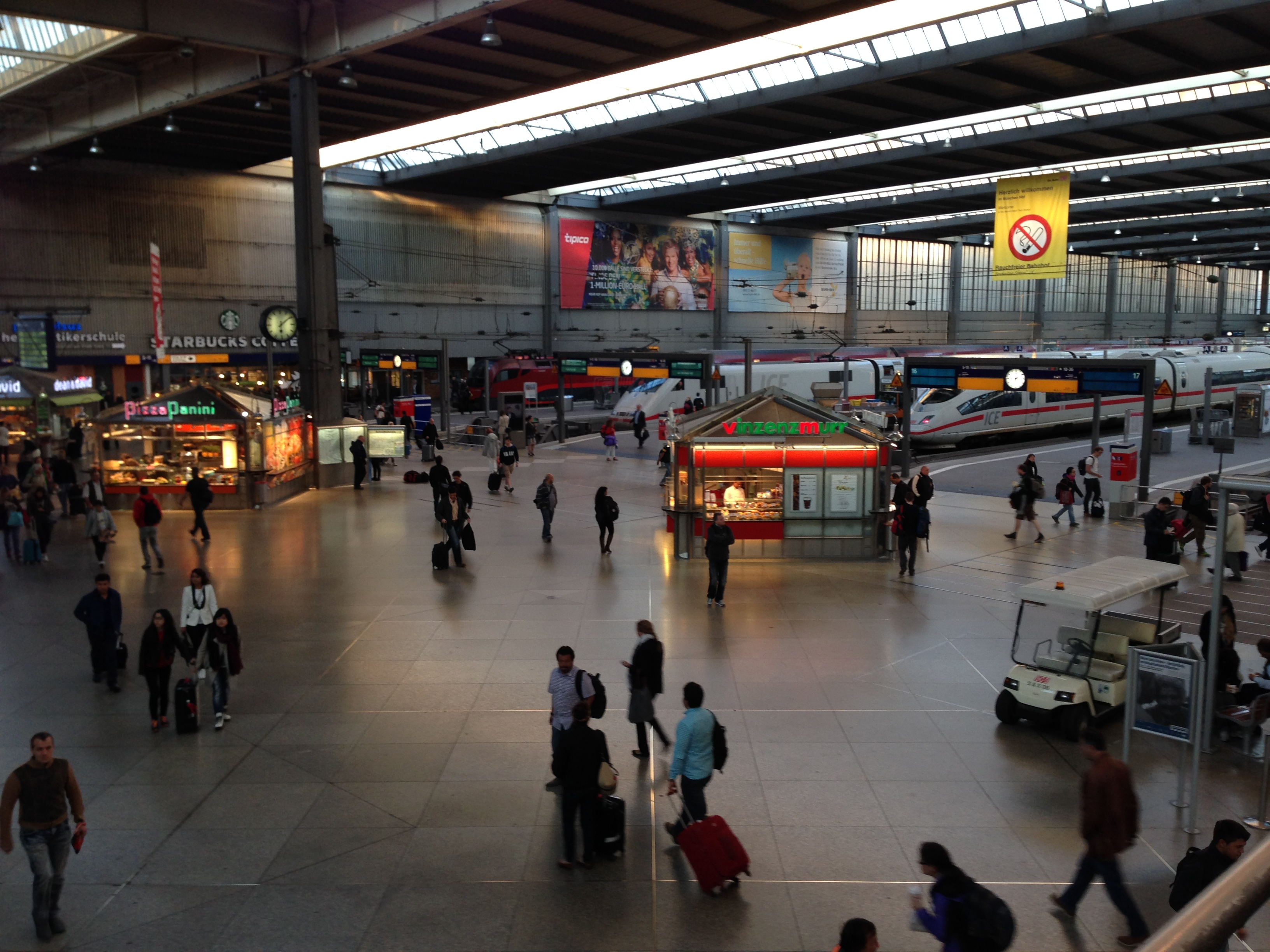 Morning Munich HB June 2014 - 2